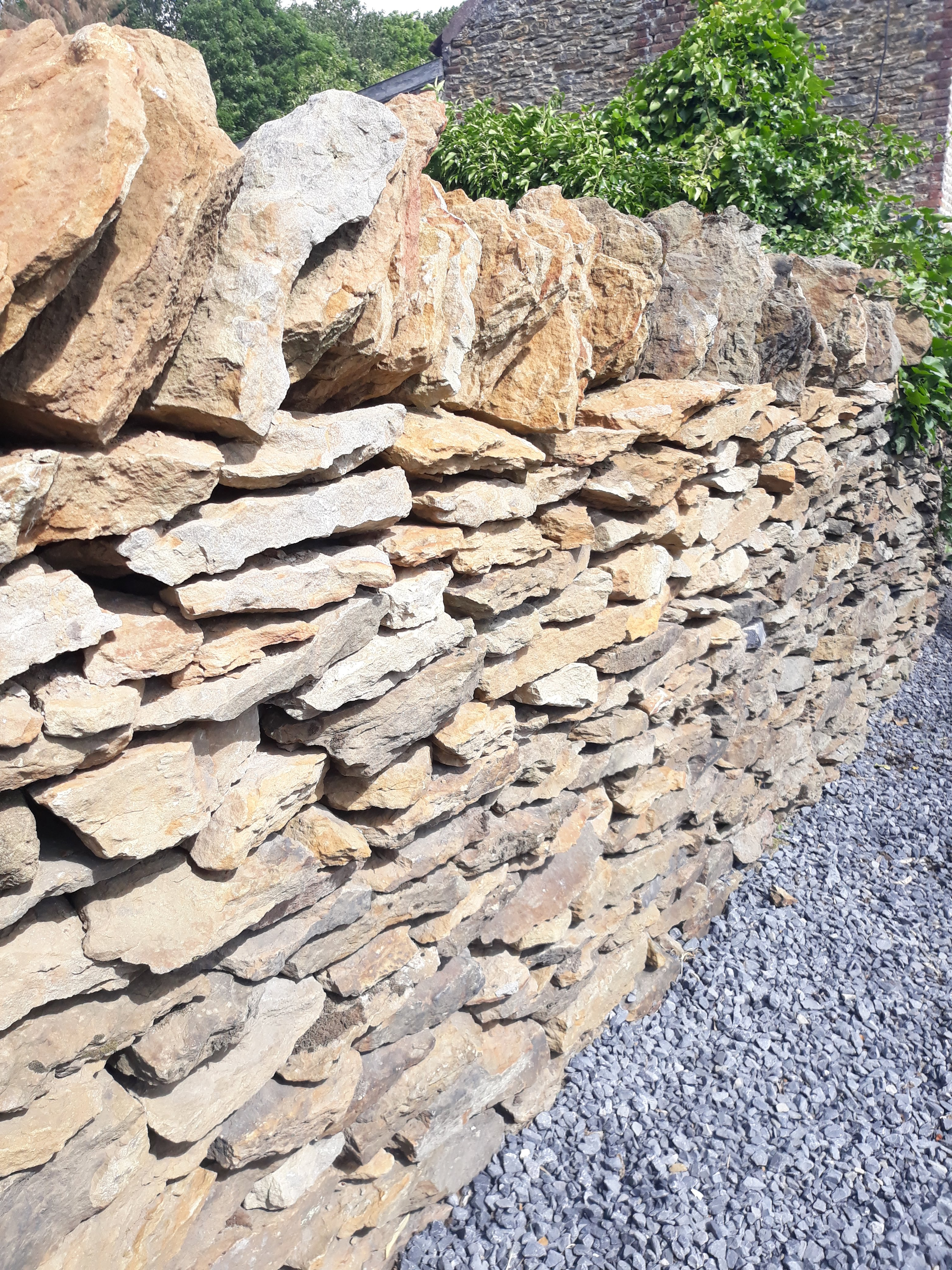 Crête à cayaux et détail sur la partie supérieure